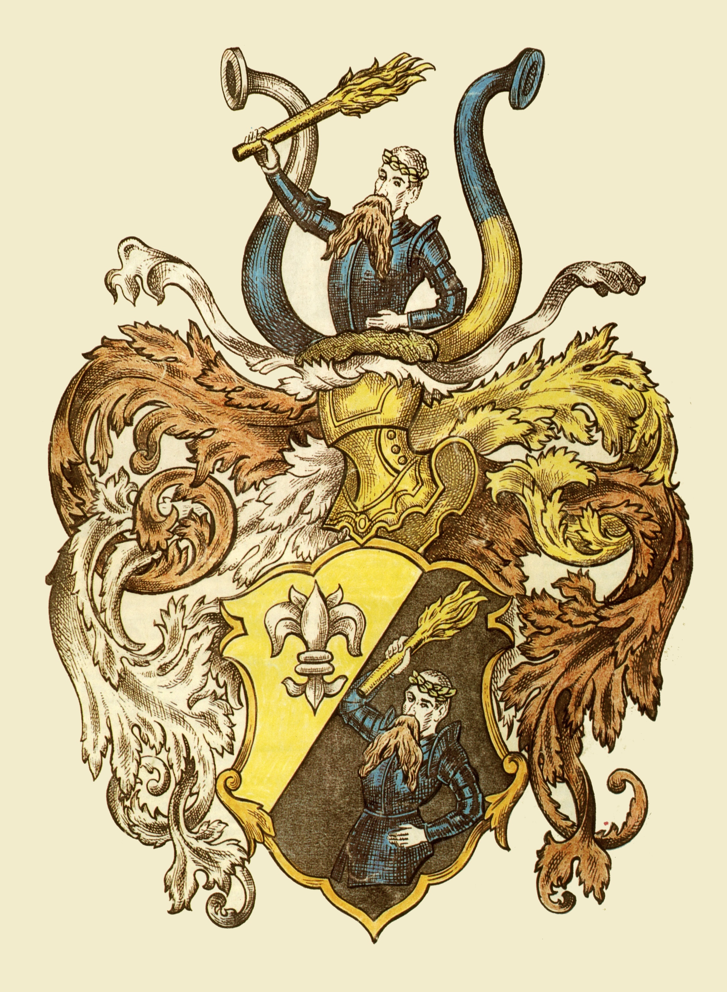 Dodatečně kolorovaný Erb Jiřího Melantricha z Aventina otiskovaný v jeho reprezentativních publikacích